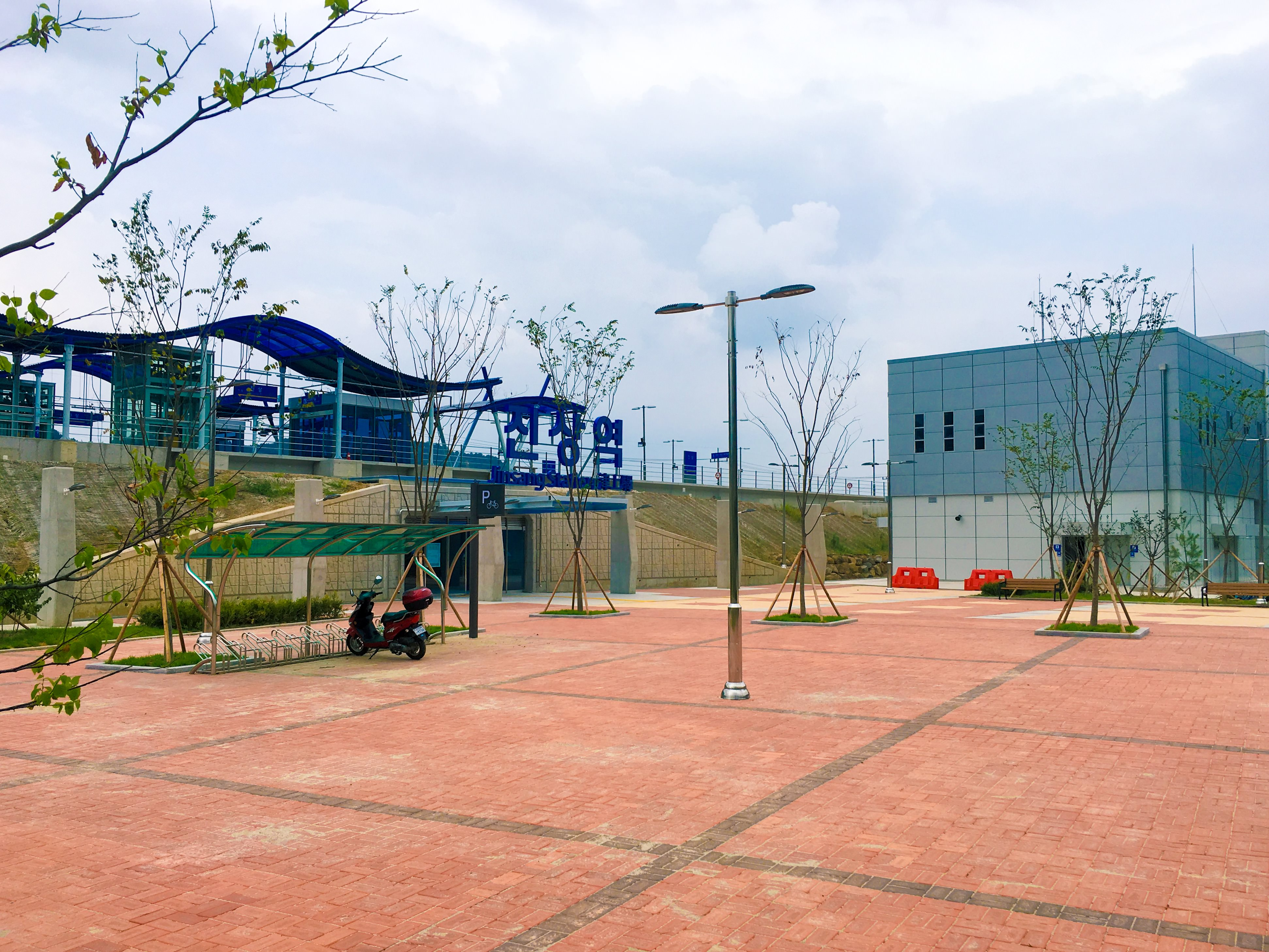 진상역 역사